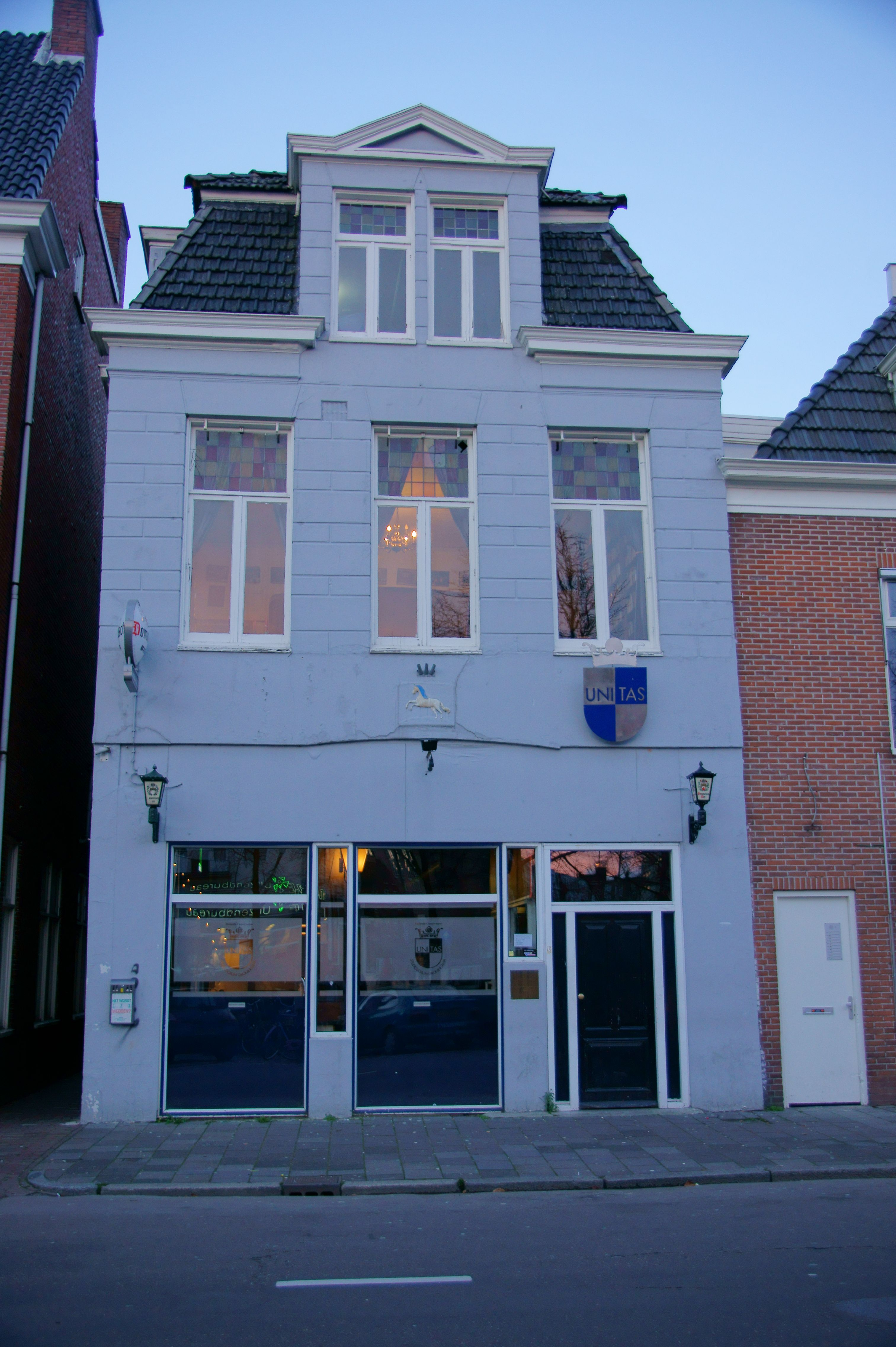 Schuitendiep 74-74a te Groningen